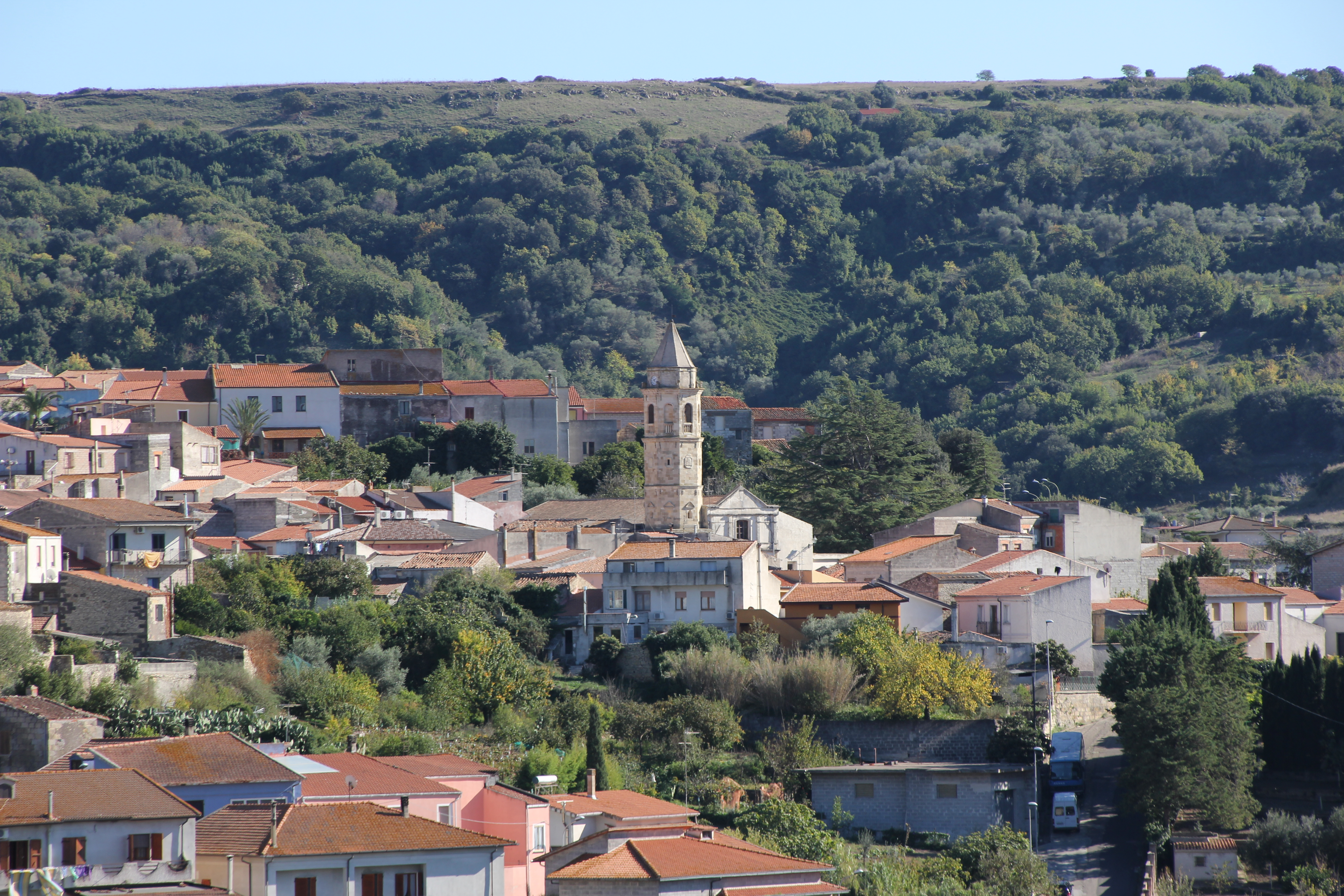 Mara - Panorama